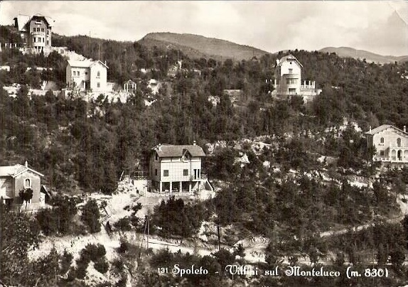 Villini a Monteluco, anni '40/'50